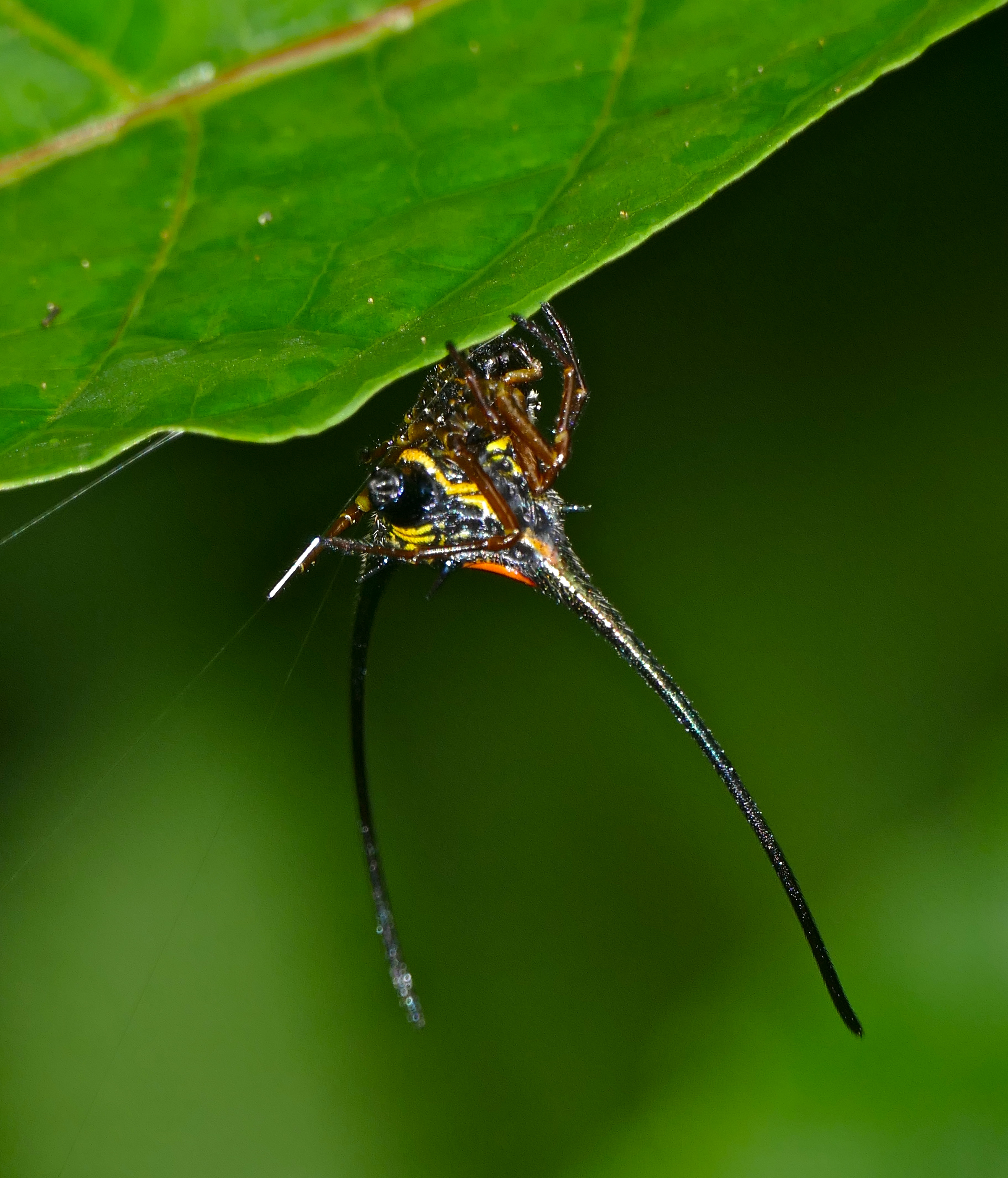 Mulu NP, Sarawak, MALAYSIA